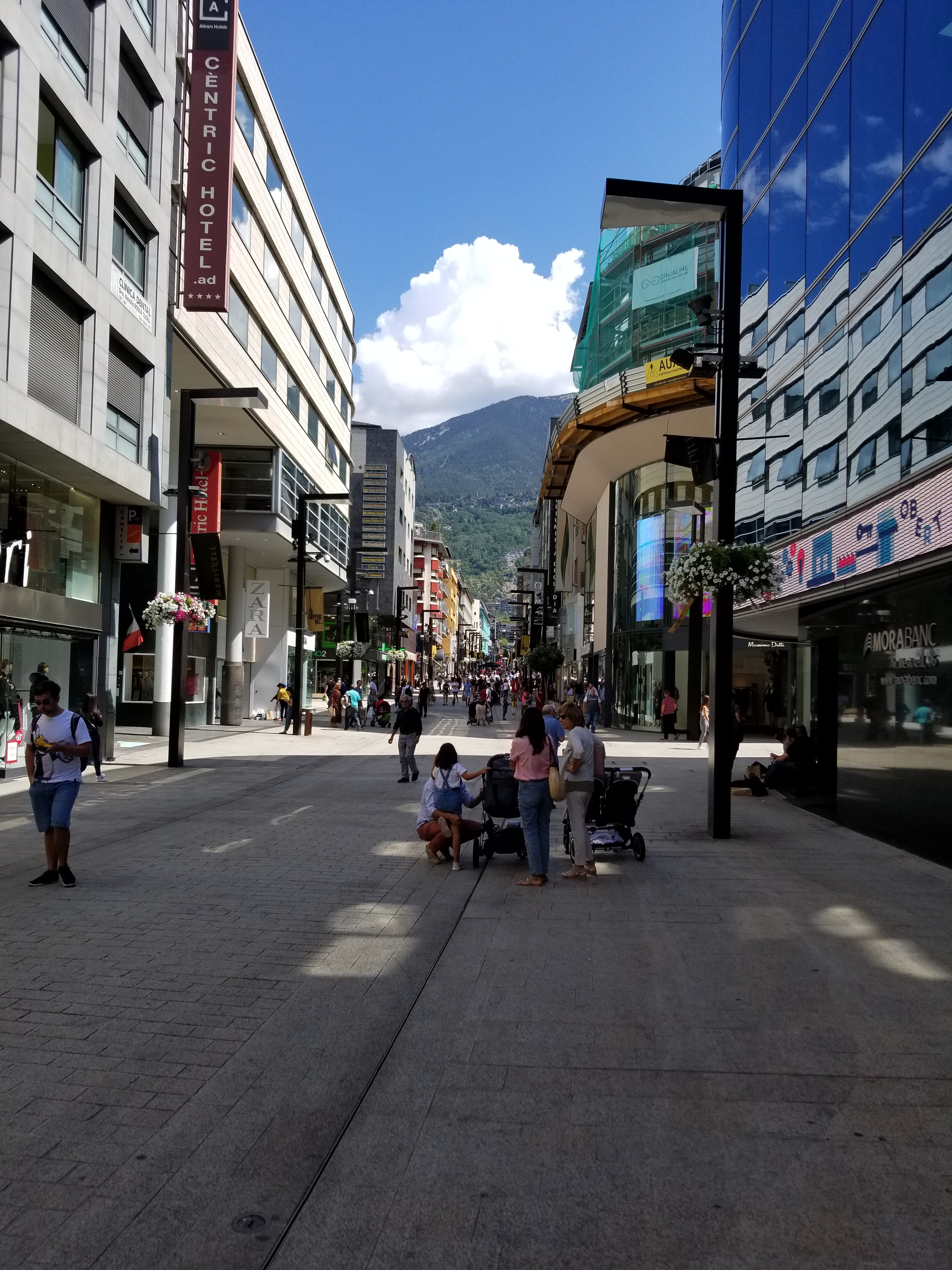 רחוב מרי טקסל באנדורה לה-ולה